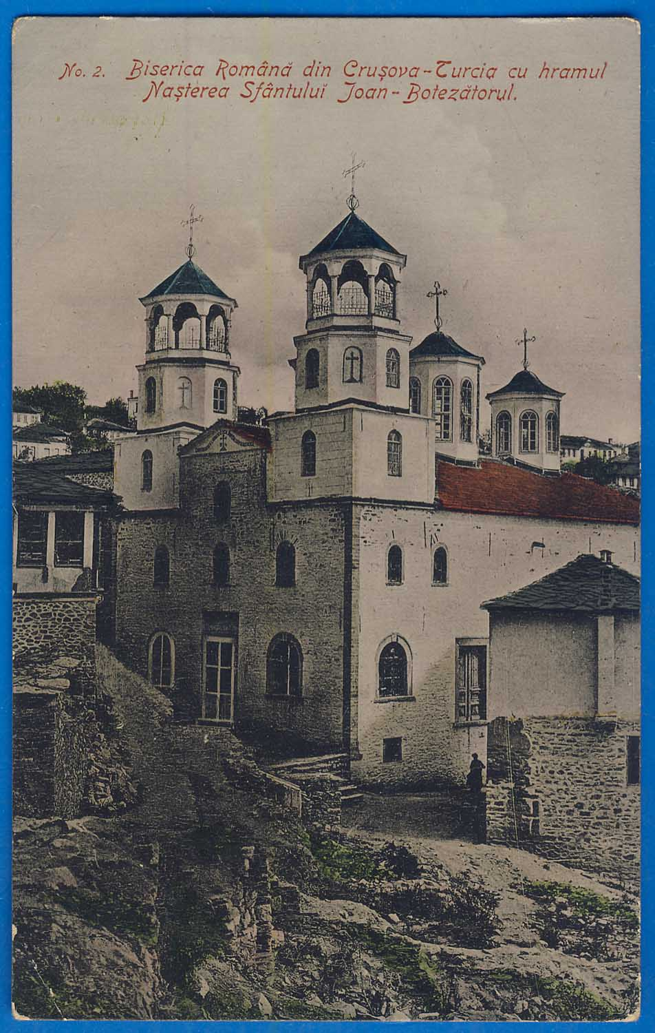 Румънската църква в Крушево "Свети Иван", пощенска картичка от началото на 20 век